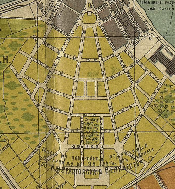 1916 План города Петрограда, исправленный на 1916 год